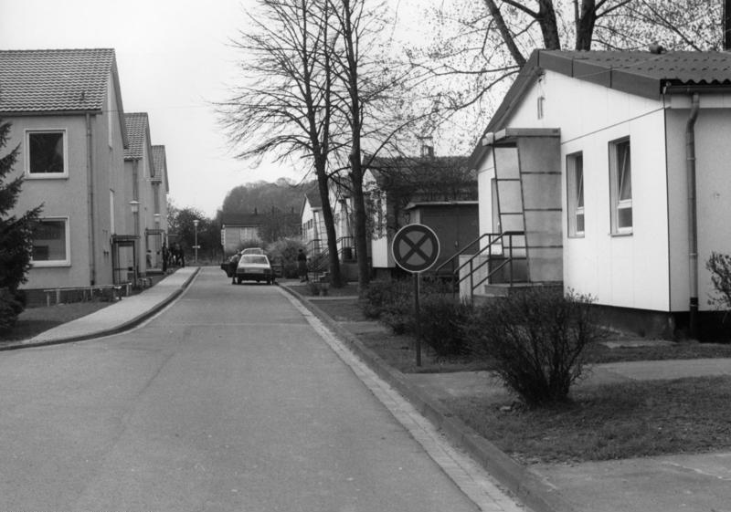 Grenzdurchgangslager Friedland Rund 2,4 Millionen Menschen fanden nach Flucht, Vertreibung, Heimkehr aus der Gefangenschaft oder Aussiedlung von 1945 bis 1975 im Grenzdurchgangslager Friedland erste Hilfe und Betreuung. Als am 8.5.1945 nach dem verlorenen II. Weltkrieg die Waffen schwiegen, wurde das im Grenzgebiet der sowjetischen, amerikanischen und britischen damaligen Besatzungszone gelegene kleine Dorf Friedland, südostwärts von Göttingen, zur Durchgangsstation für viele Menschen. Das ehemalige Versuchsgut der Universität Göttingen in Friedland war der bescheidene Ausgangspunkt für das heutige Lagerdorf mit allen notwendigen Sozialeinrichtungen und Hilfsdiensten. Auch heute noch (1982) ist Friedland für jährlich Tausende von Aussiedlern aus Osteuropa erste Anlaufstelle und Hoffnung. Im Bild: Eine Straße im Lager - ein Stück Geborgenheit